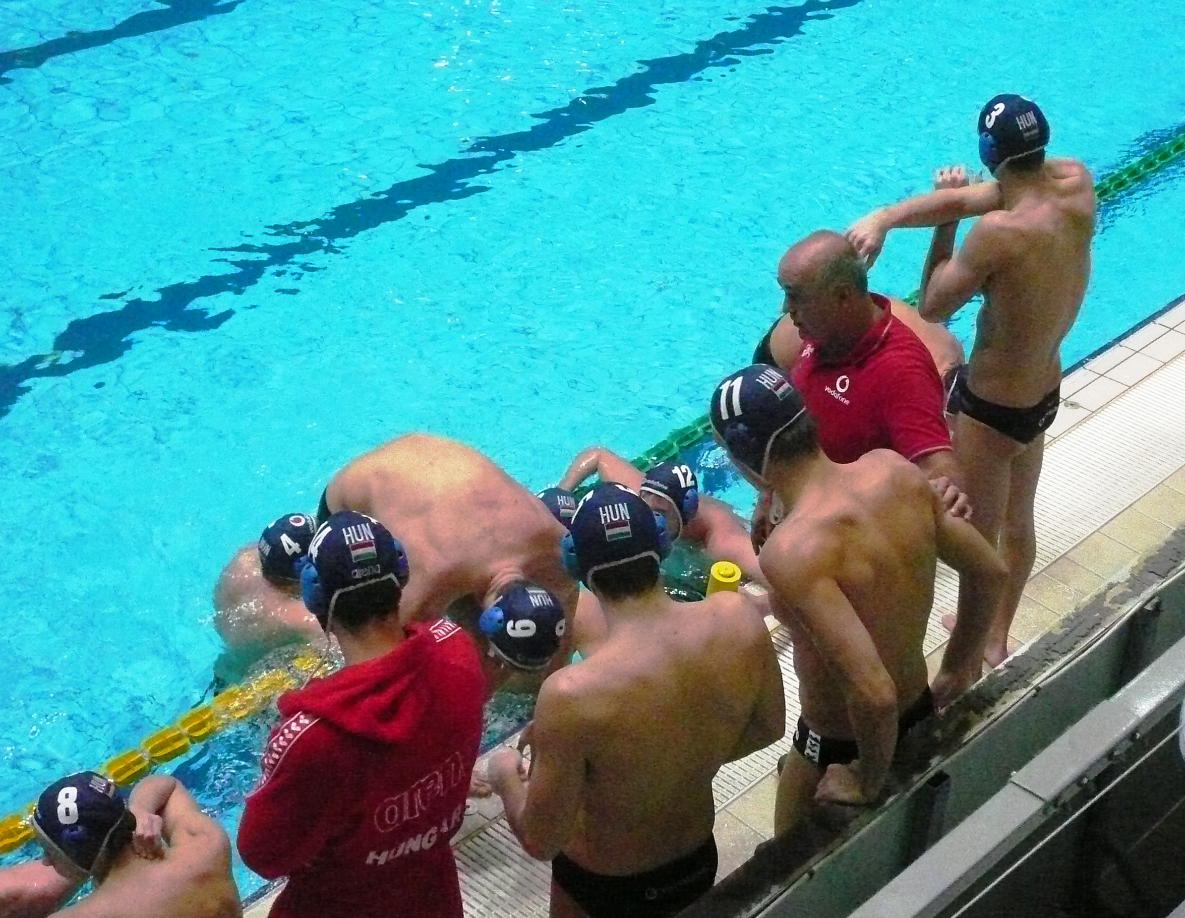 Dr. Horkai György eligazítást tart a Magyar Junior válogatott tagjainak a ZF Eger edzőmérkőzésen.